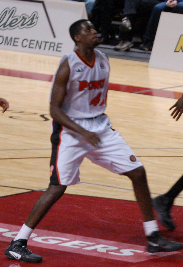 Summerside Storm vs Oshawa Power